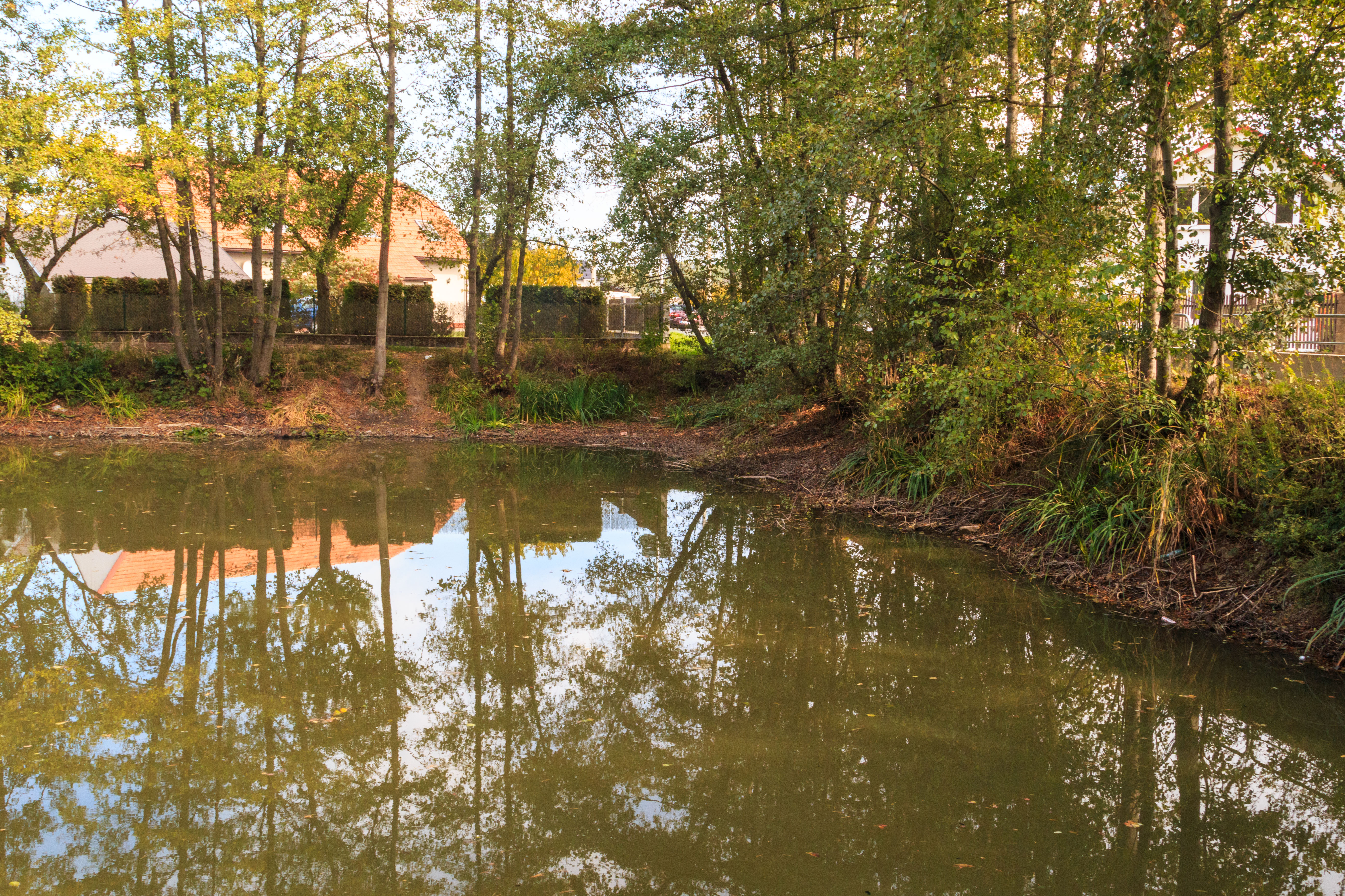 Návesní rybník v Osicích Project: Vodstvo